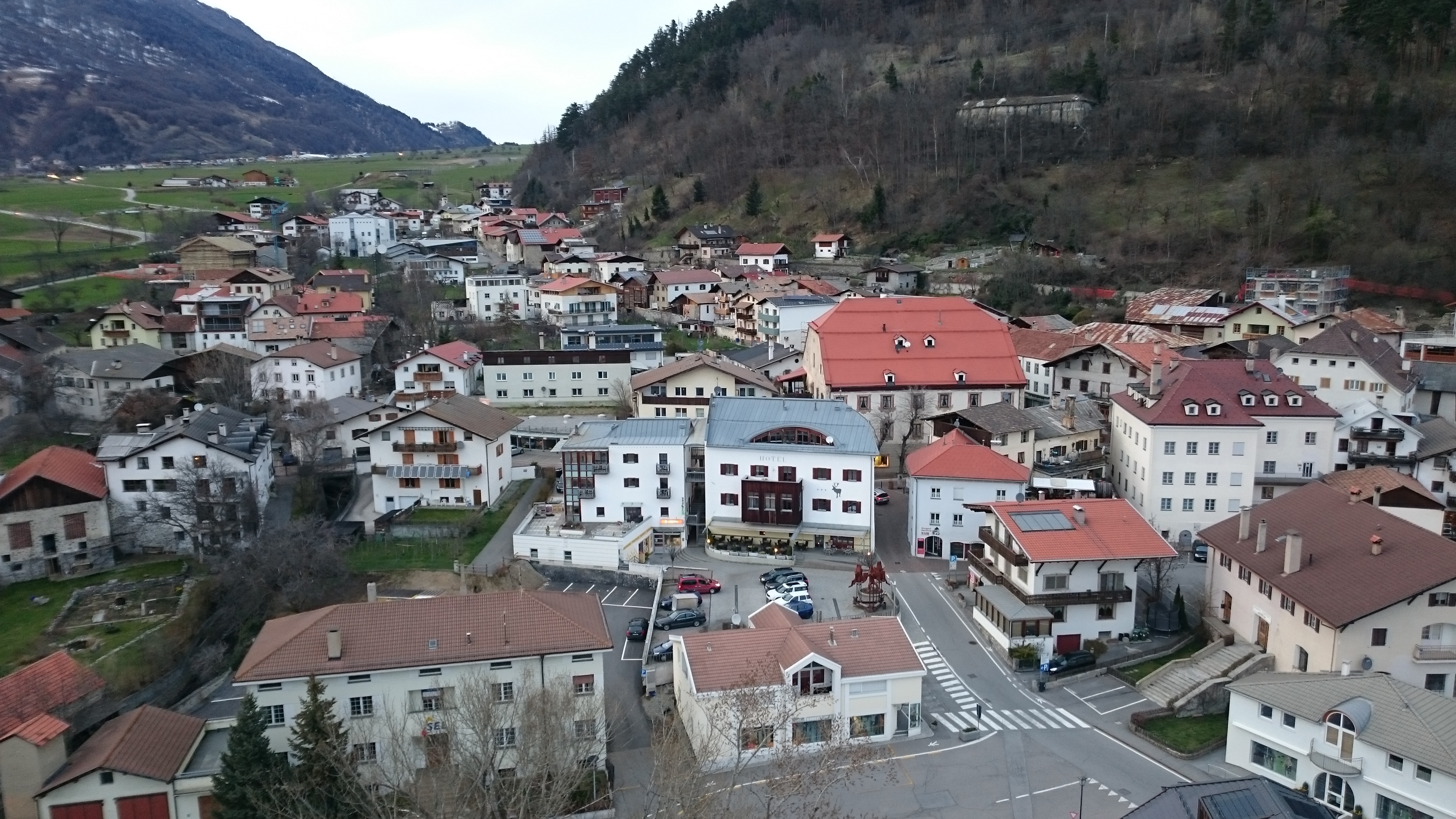 Malser Ortskern und Oberdorf